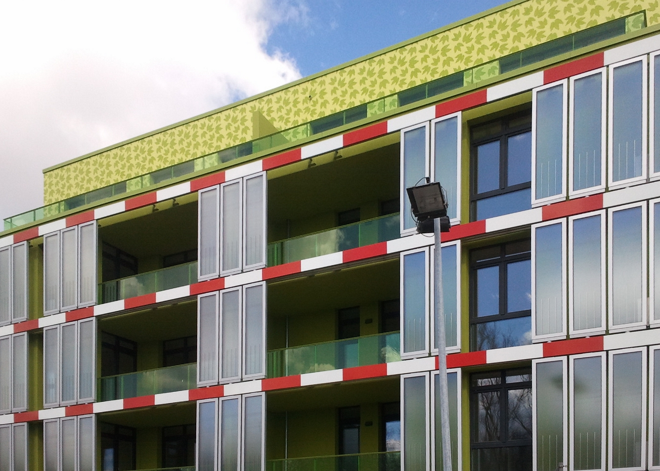 Das Algenhaus ist ein Demonstrationsprojekt der IBA in Hamburg und besitzt weltweit erstmals eine Fassade mit integrierten Photobioreaktoren.